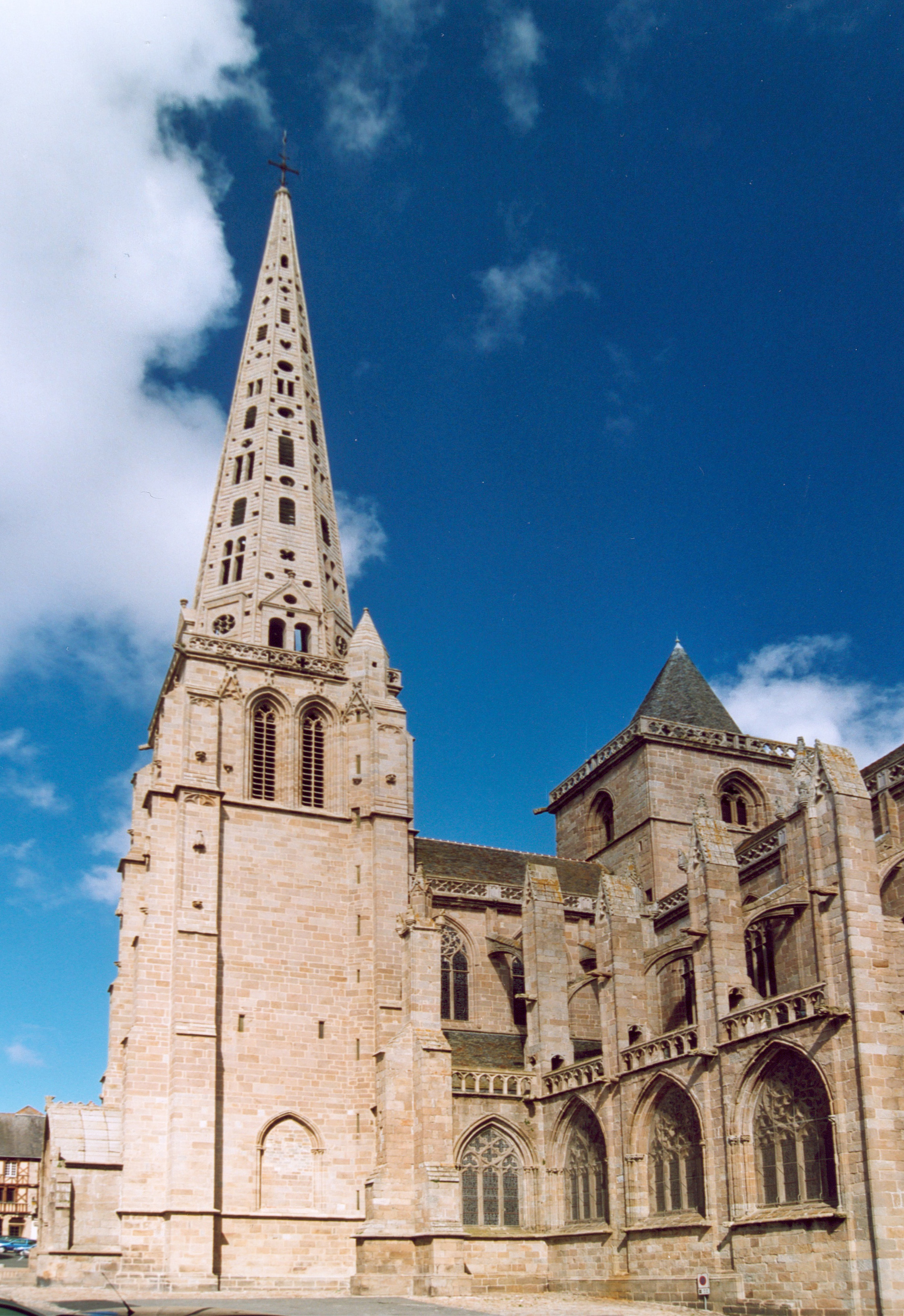 France Bretagne Côtes d'Armor Tréguier Cathédrale Saint-Tugdual Photographie prise par GIRAUD Patrick